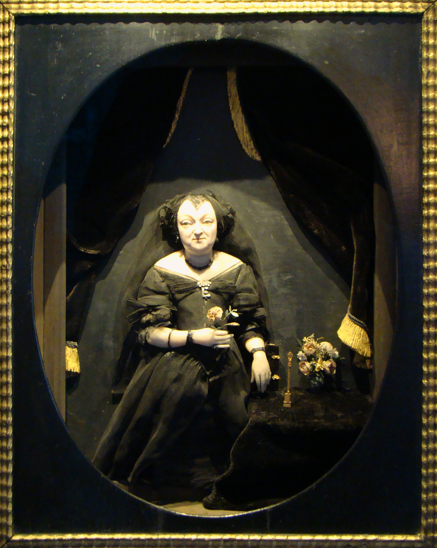 Hist. Exponat, Schlossmuseum Gotha, Schloss Friedenstein Passepartout mit Wachsfigur